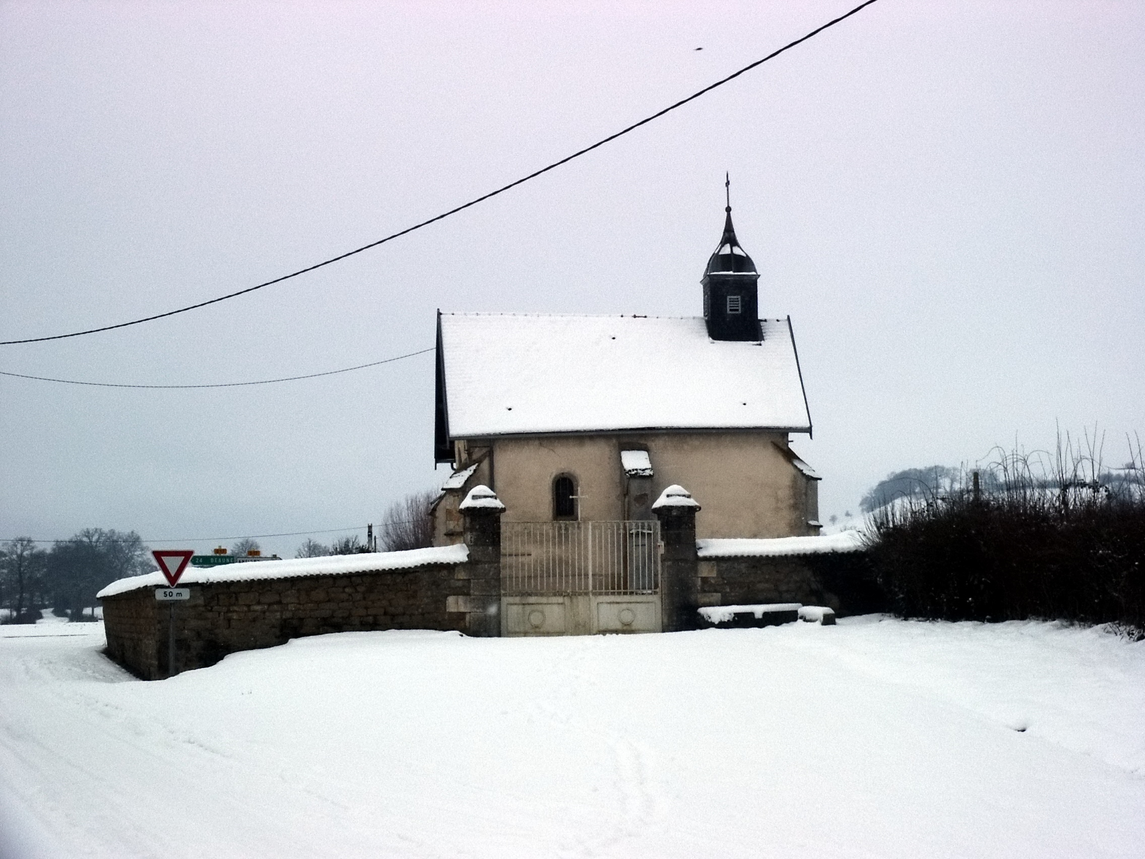 Photo de Veilly prise par moi-même en décembre 2004.